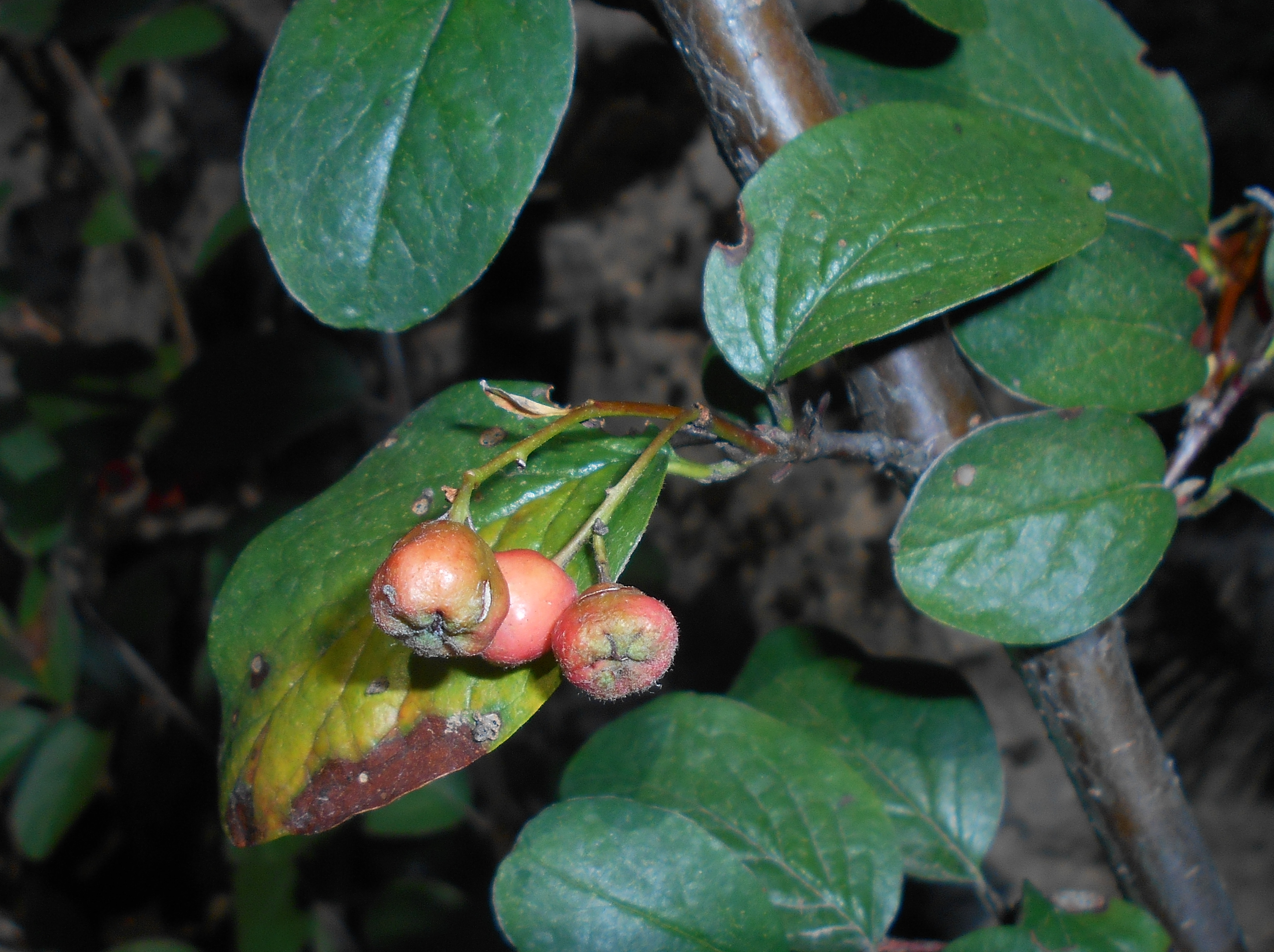 Irga kutnerowata (Cotoneaster nebrodensis), Ogród Botaniczny UMCS w Lublinie.